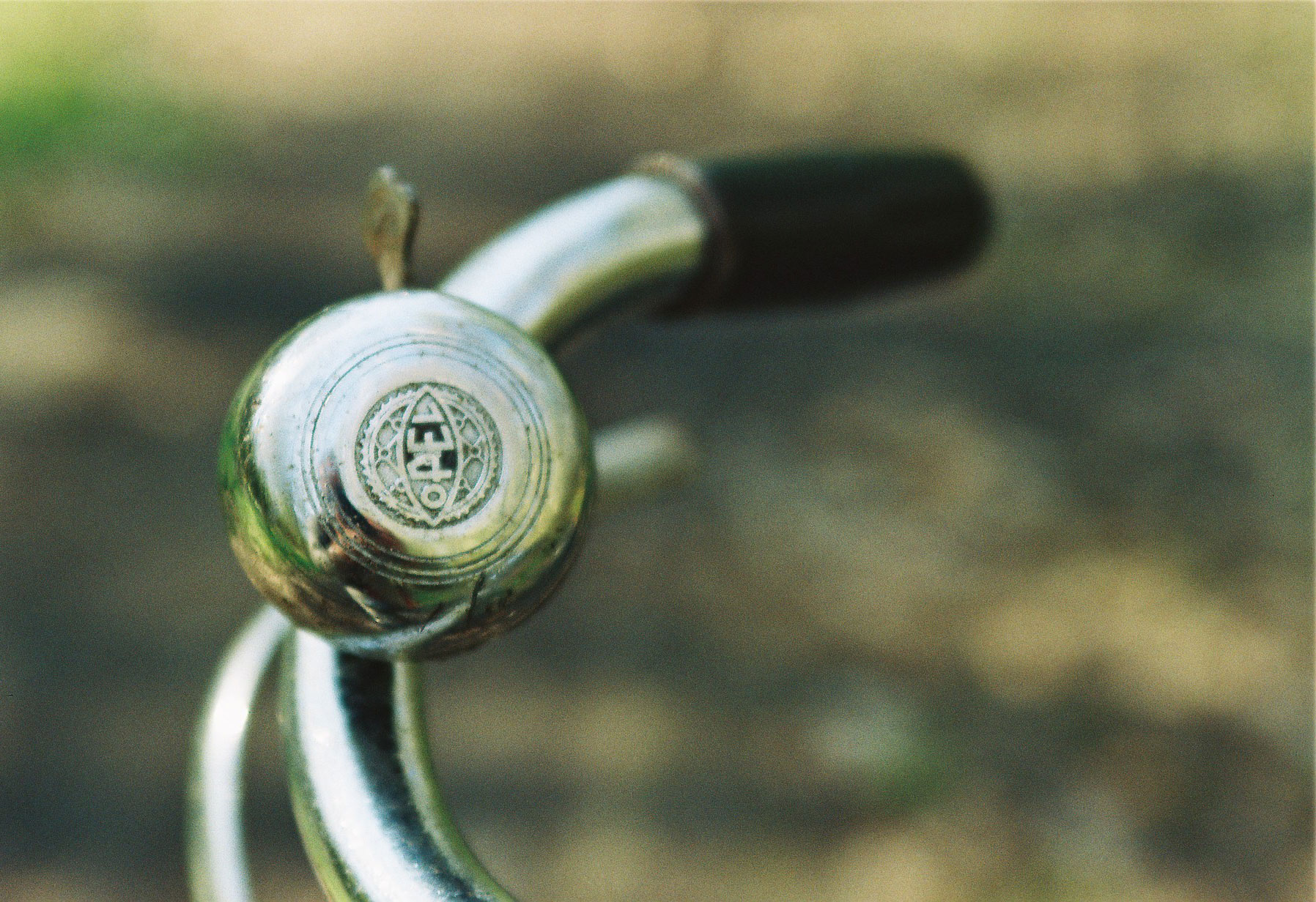 Opel- fahrrad baujahr 1935 mit Doppelschleifen- Rohrrahmen